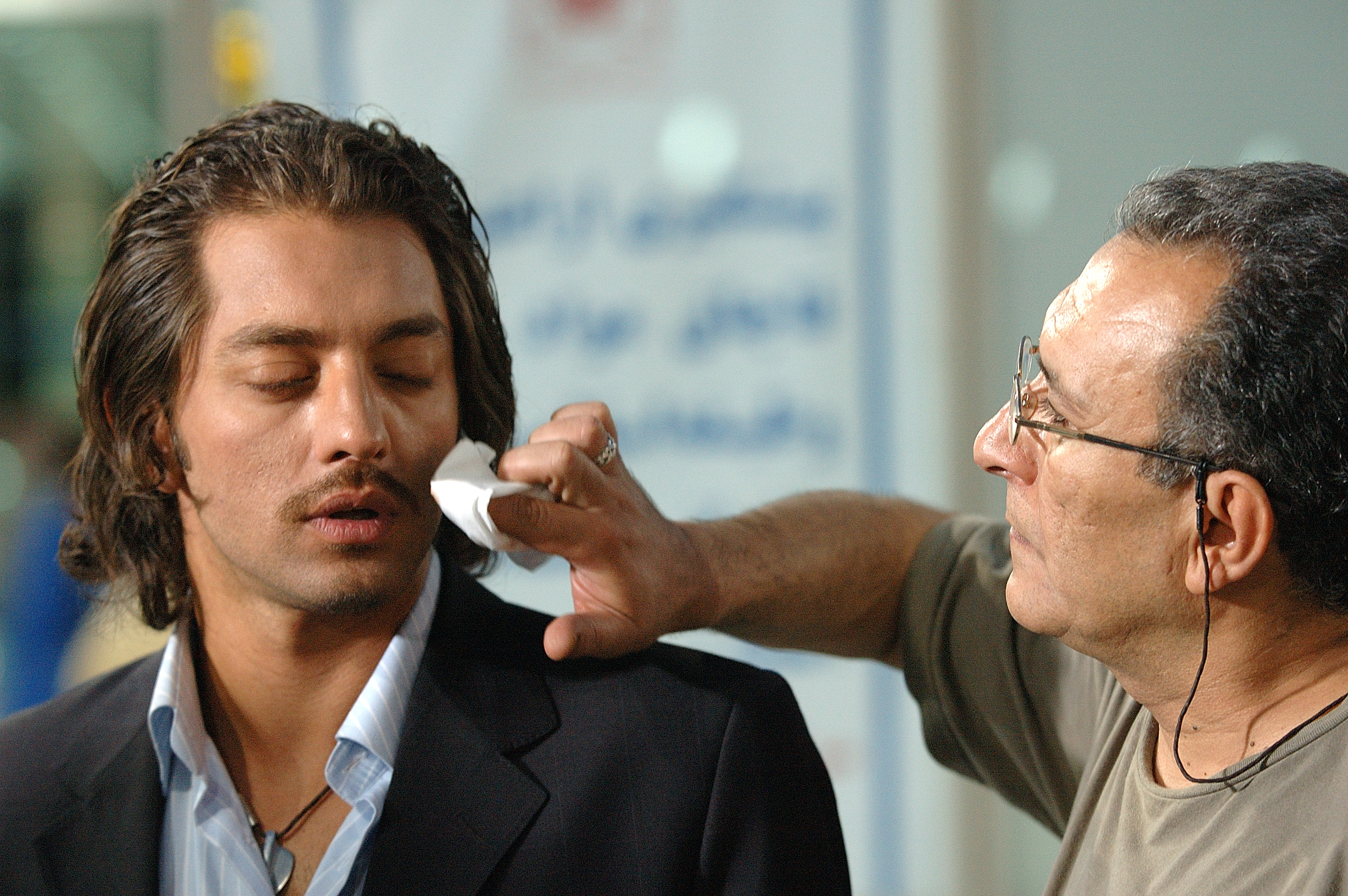 در حال گریم بهرام رادان در فیلم تقاطع 1384